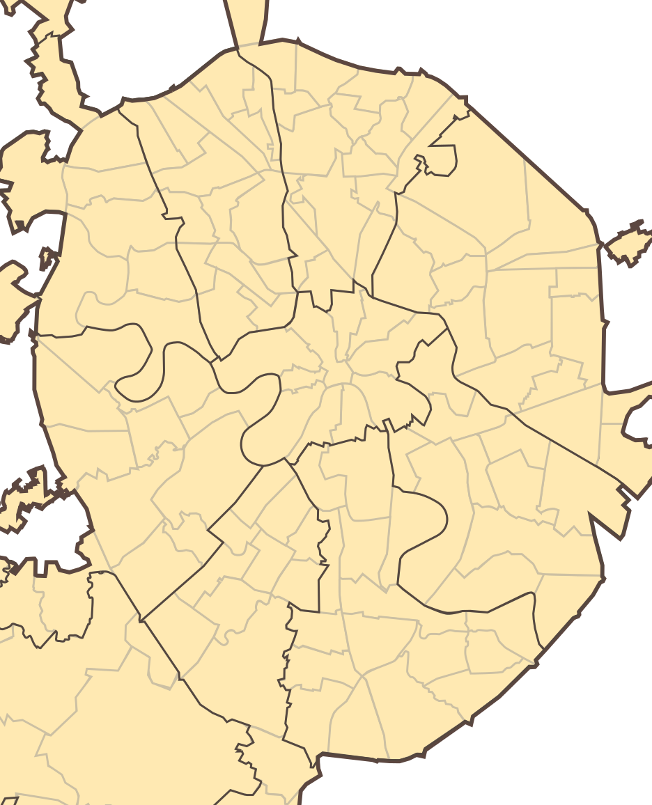 Чистая карта-заготовка для создания других карт Москвы